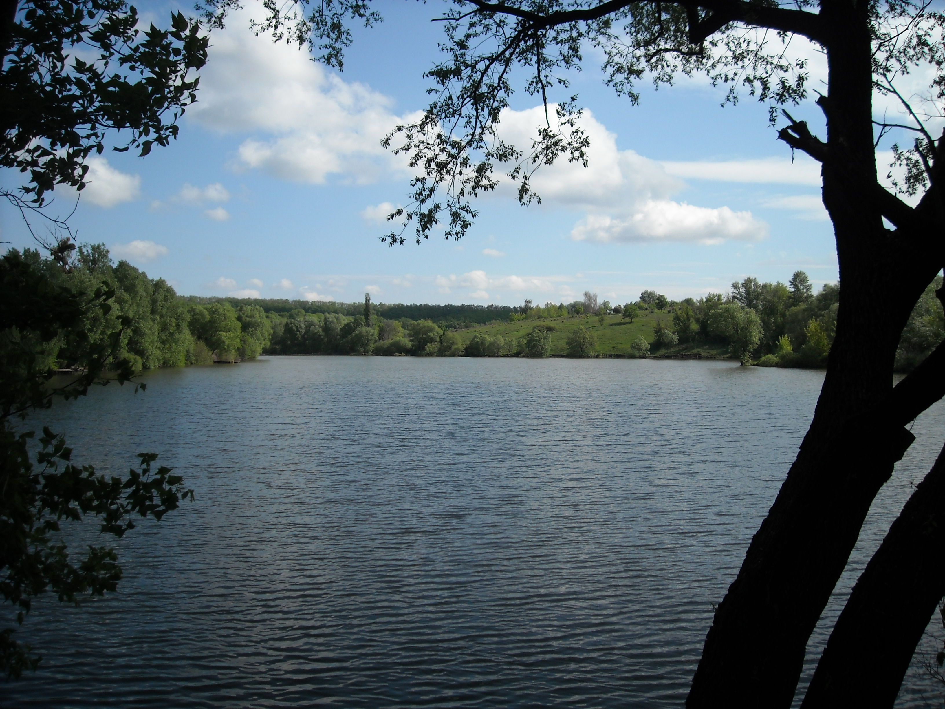 село Константовка, вид с дамбы. На холме была усадьба Донцов-Захаржевских.